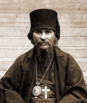 архиепископ Алеутский Евдоким (Мещерский)